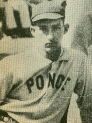 El lanzador Francisco "Paquito" Alfonso Montaner Garcia de Ponce, Puerto Rico, cerca del año 1912.